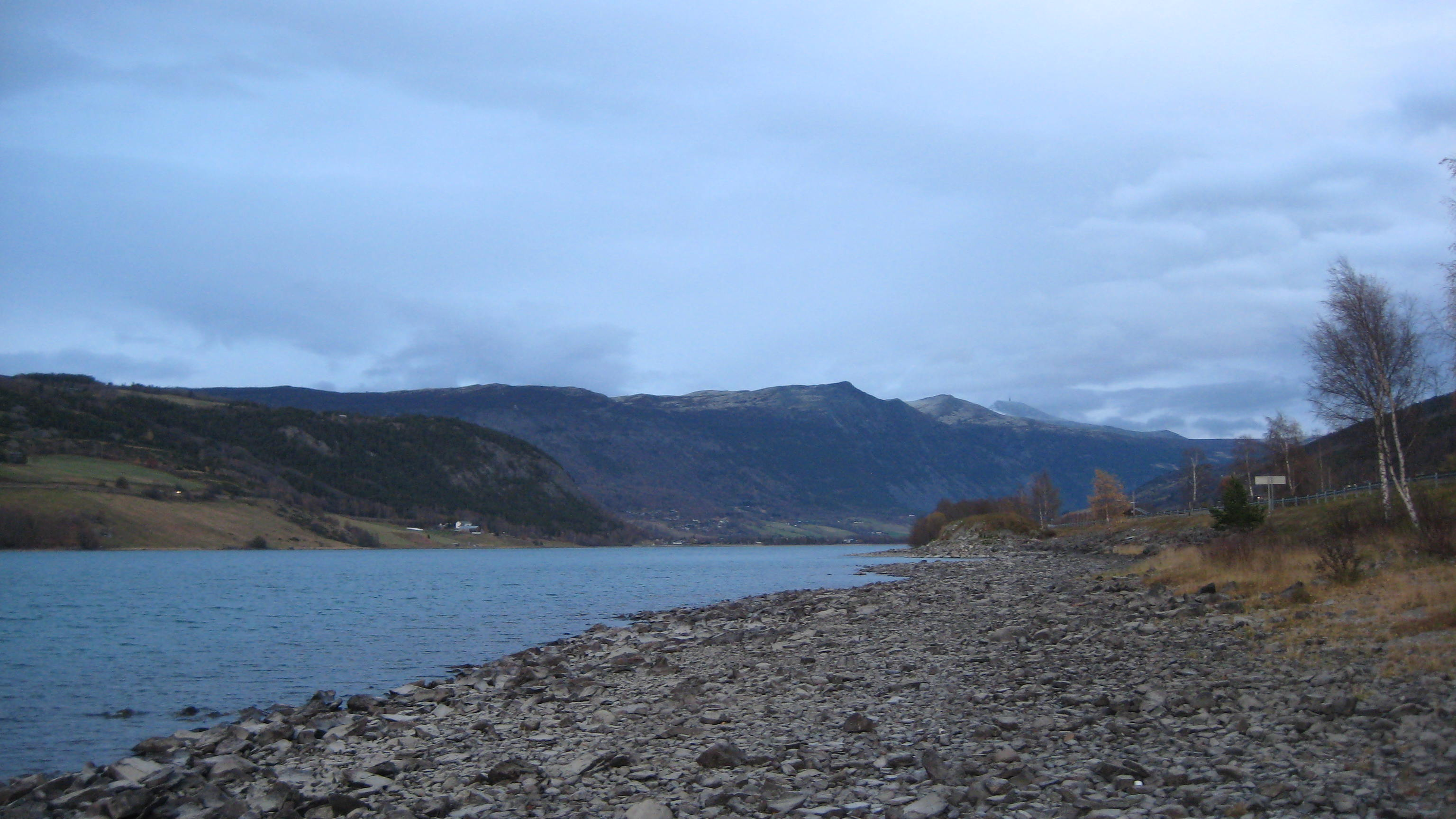 Vågåvatnet sett mot øst.